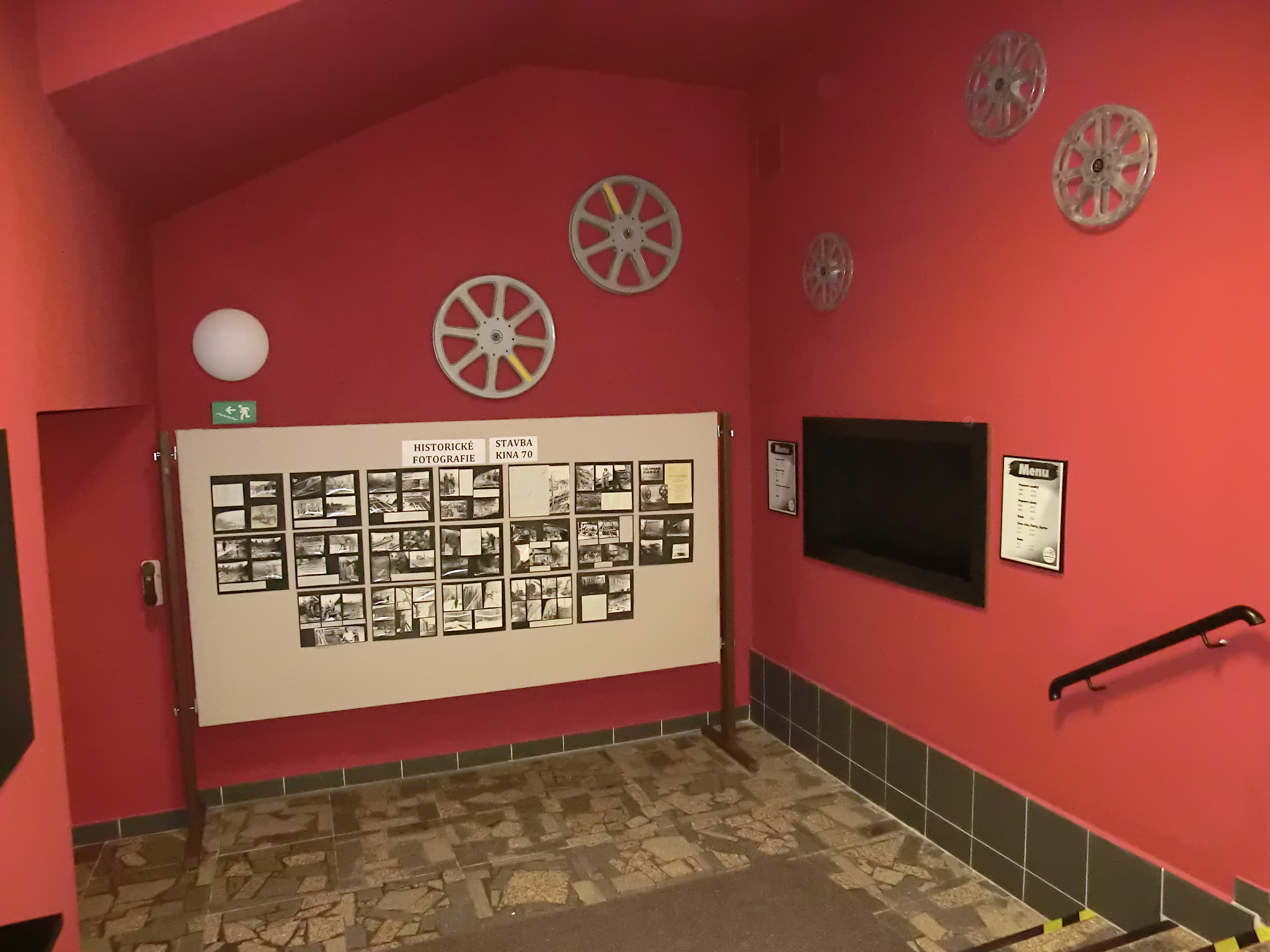 Vestibul kina po rekonstrukci 2013 - vlevo příchod od pokladny, vpravo okénko pro prodej občerstvení, uprostřed výstavka s historickými fotografiemi z let 1967-70.